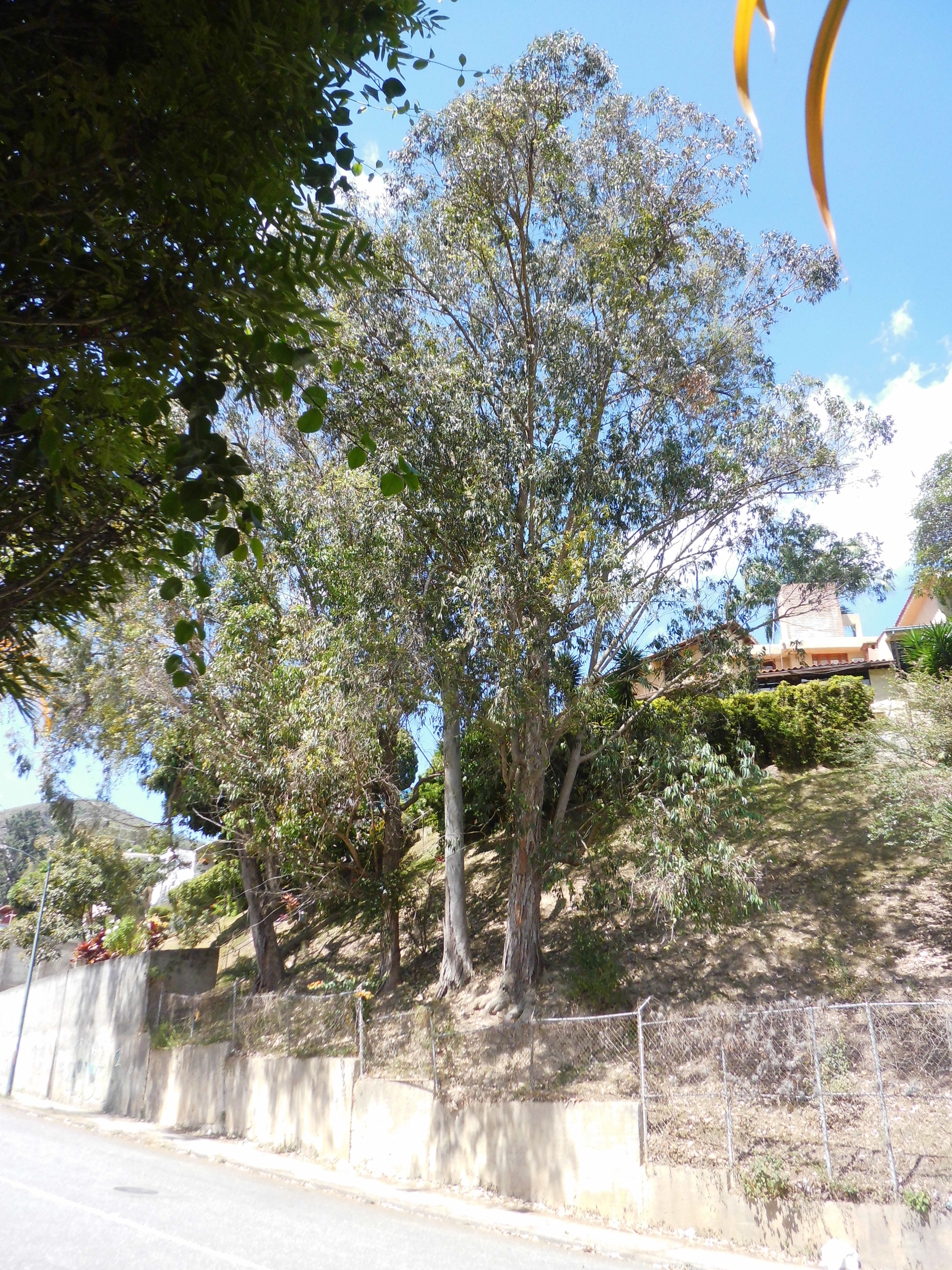 Eucalyptus camaldulensis Dehnh. localizadas en La Boyera municipio El Hatillo, estado Miranda - Venezuela.